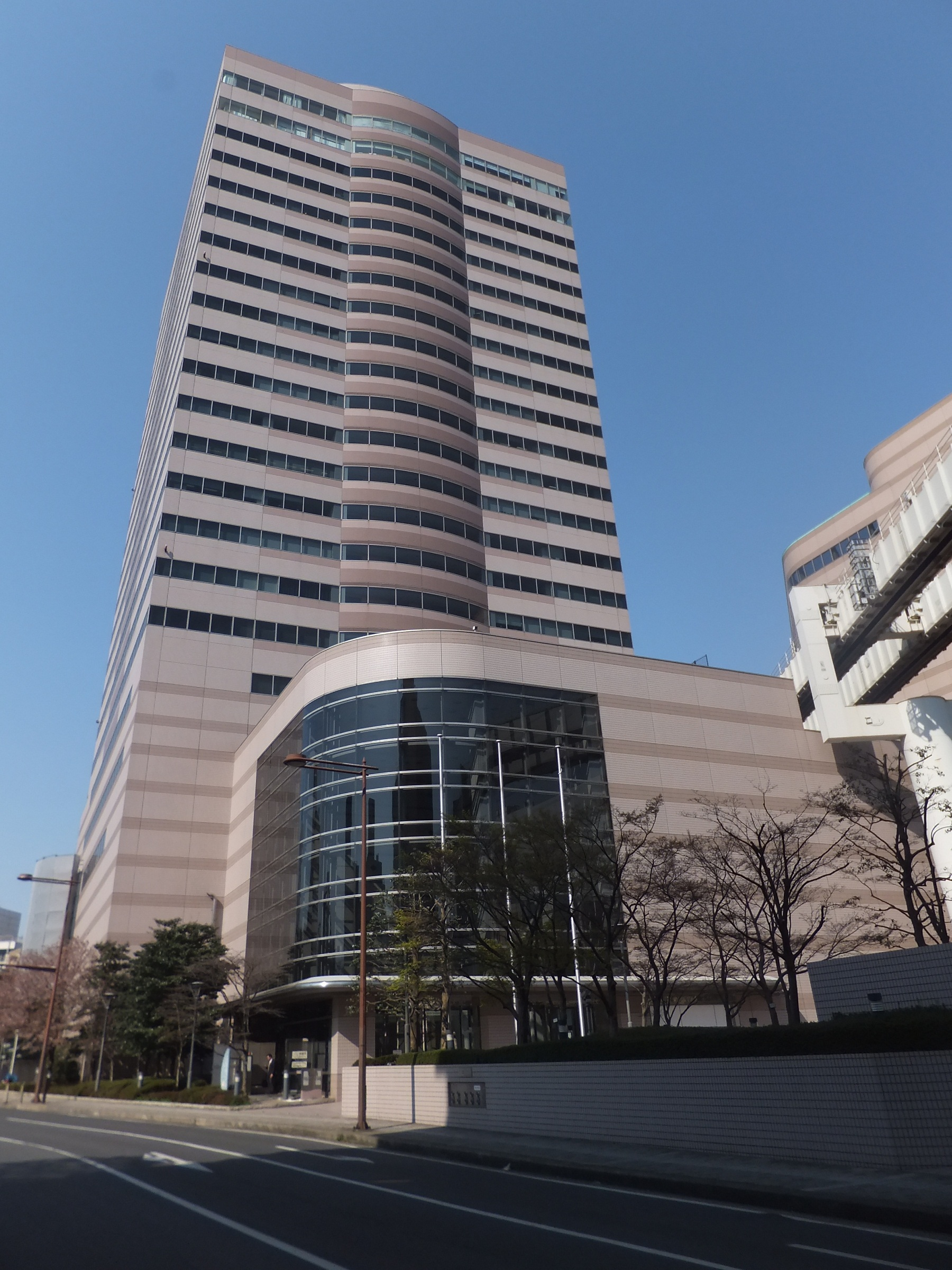 千葉市中央区、センシティタワー